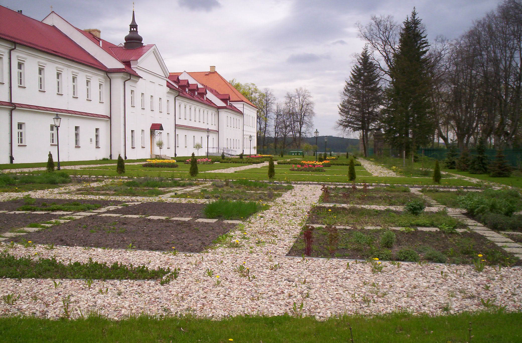 Ogród renesansowy przy klasztorze w Supraślu